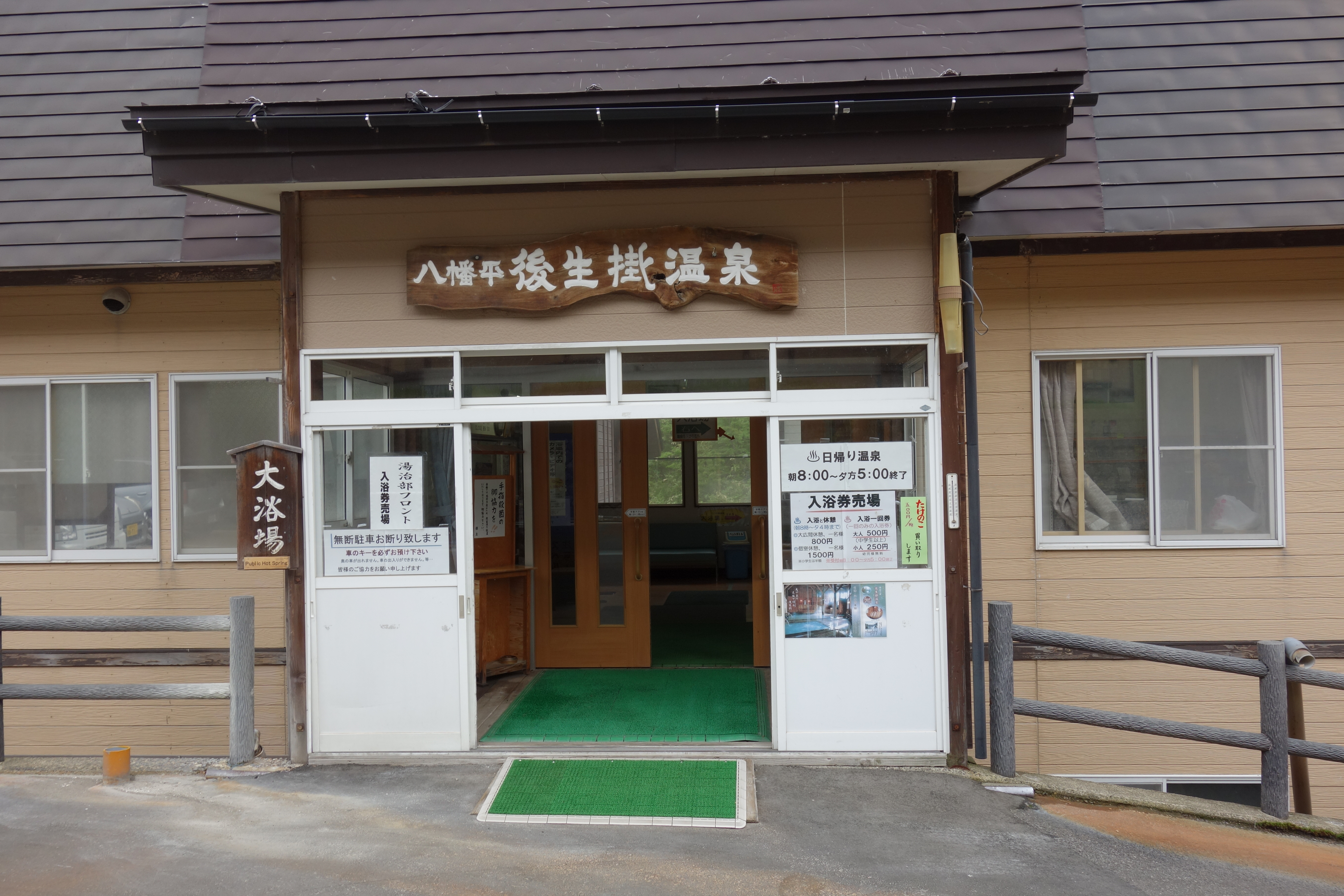 後生掛温泉湯治部入り口